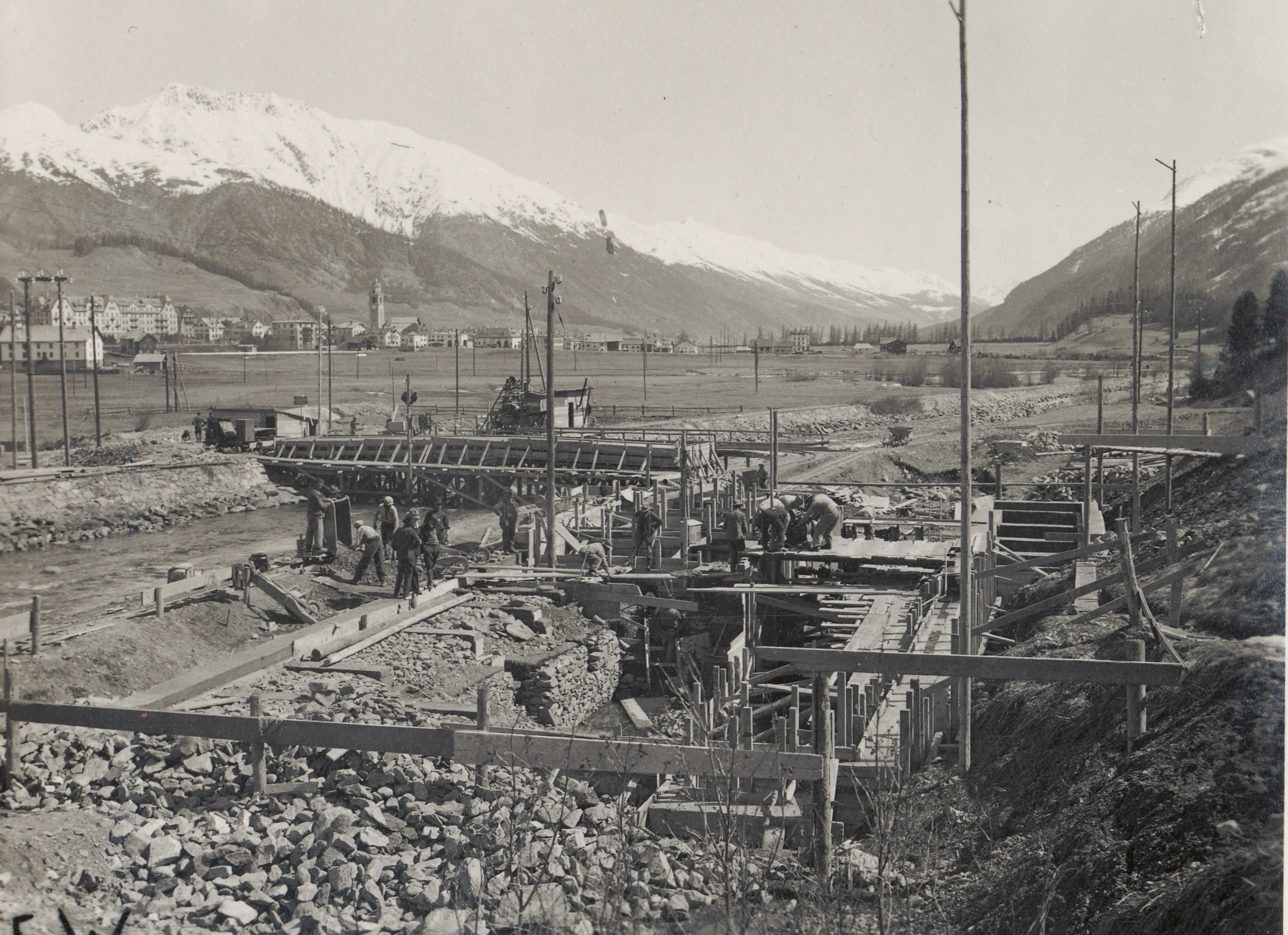 Bau des Kraftwerks Islas 1932: Das Kraftswerkgebäude liegt rechts vom Inn, und eine neue Eisenbetonbrücke stellt die Verbindung mit dem jenseitigen Ufer und der Zufahrtsstrasse her.